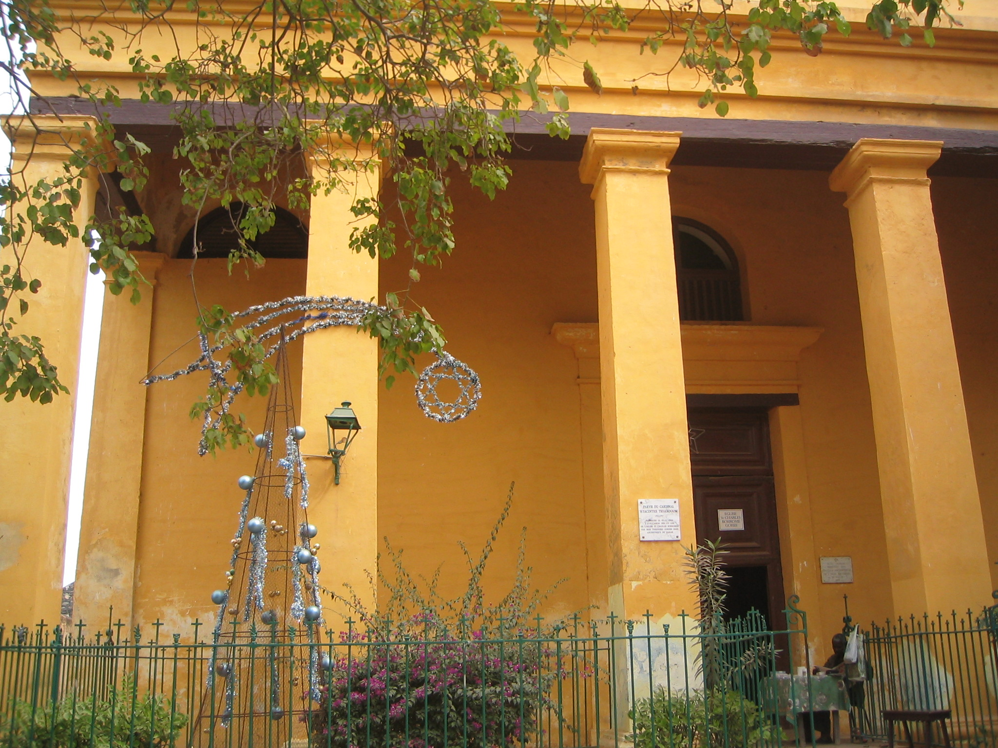 Eglise Saint-Charles-Borromée sur l'île de Gorée au Sénégal, peu après Noël